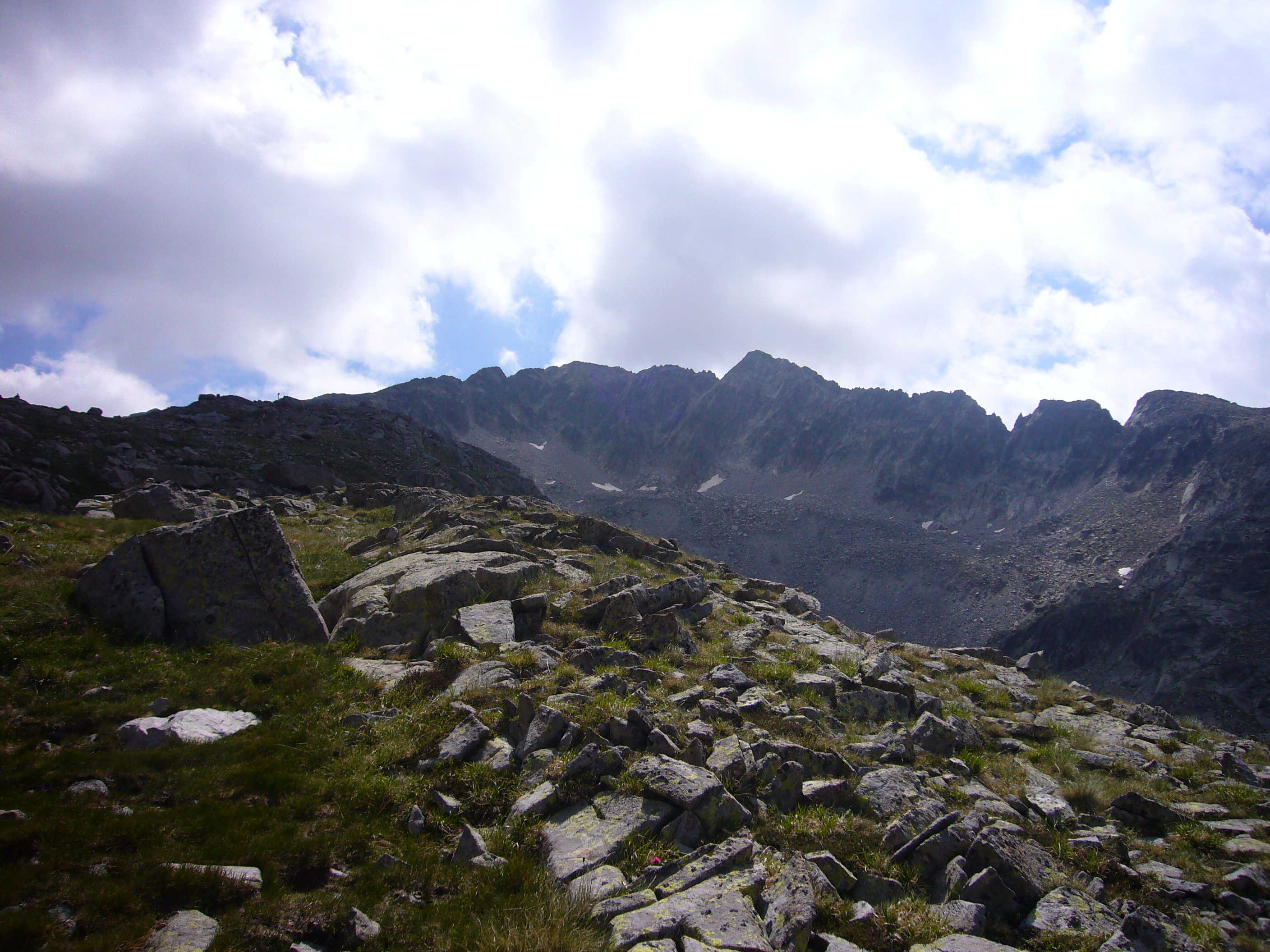 Pala Alta de Sarradé, vista des de la Vall de Comalesbienes; la Vall de Boí, Alta Ribagorça, Catalunya